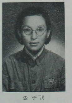 中文（台灣）: 中國人民政治協商會議第一屆全體會議代表